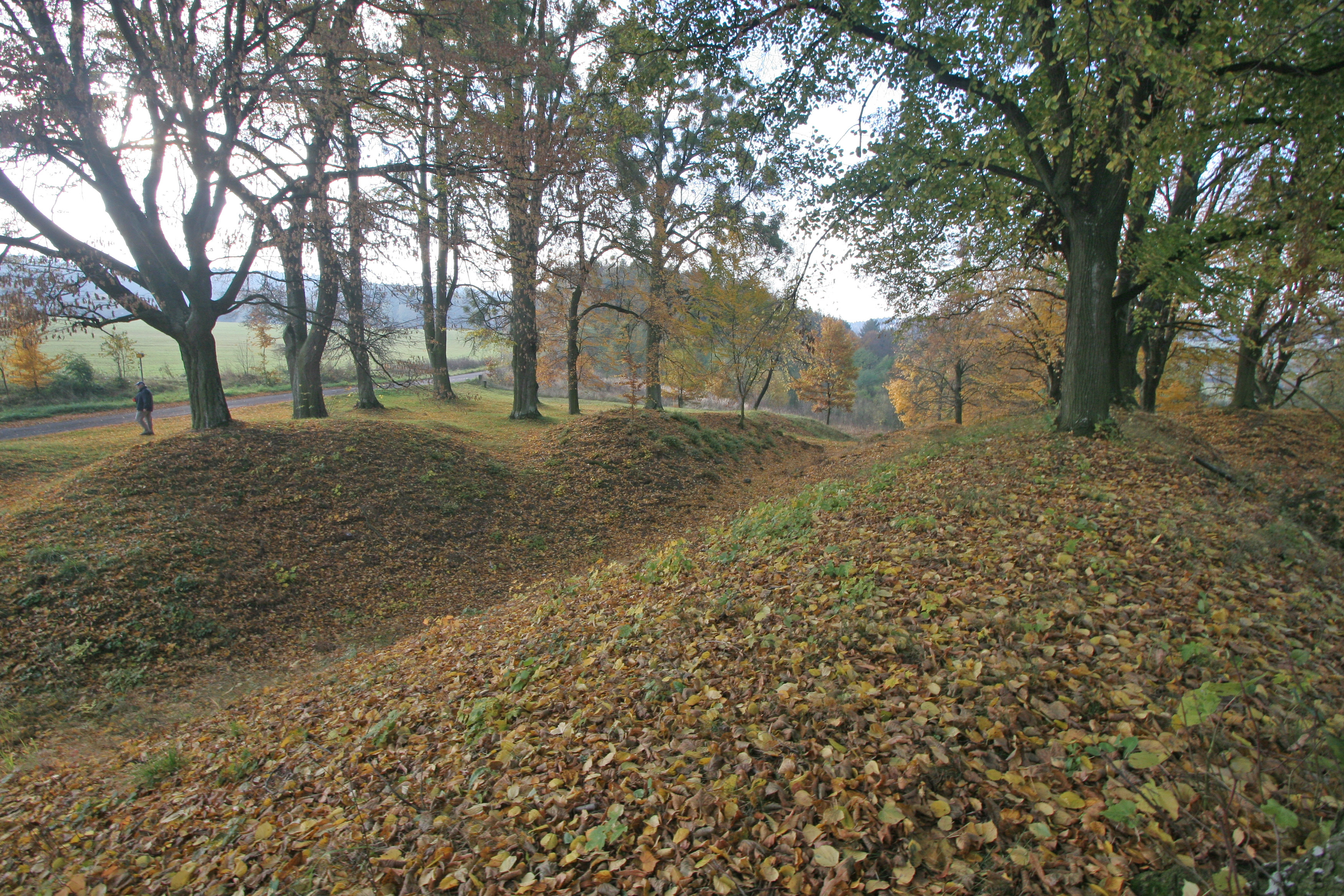 Valy tvrze, Kostelec u Heřmanova Městce